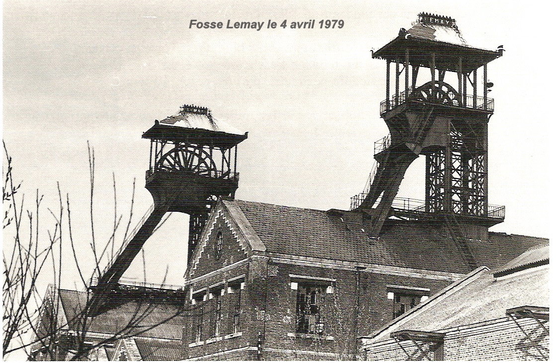 Fosse Lemay de la Cie des mines d'Aniche disparue